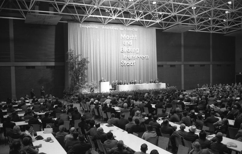 Tagung des Evangelischen Arbeitskreises CDU/CSU mit Bundeskanzler Prof. Erhard in Bochum, Ruhrlandhalle